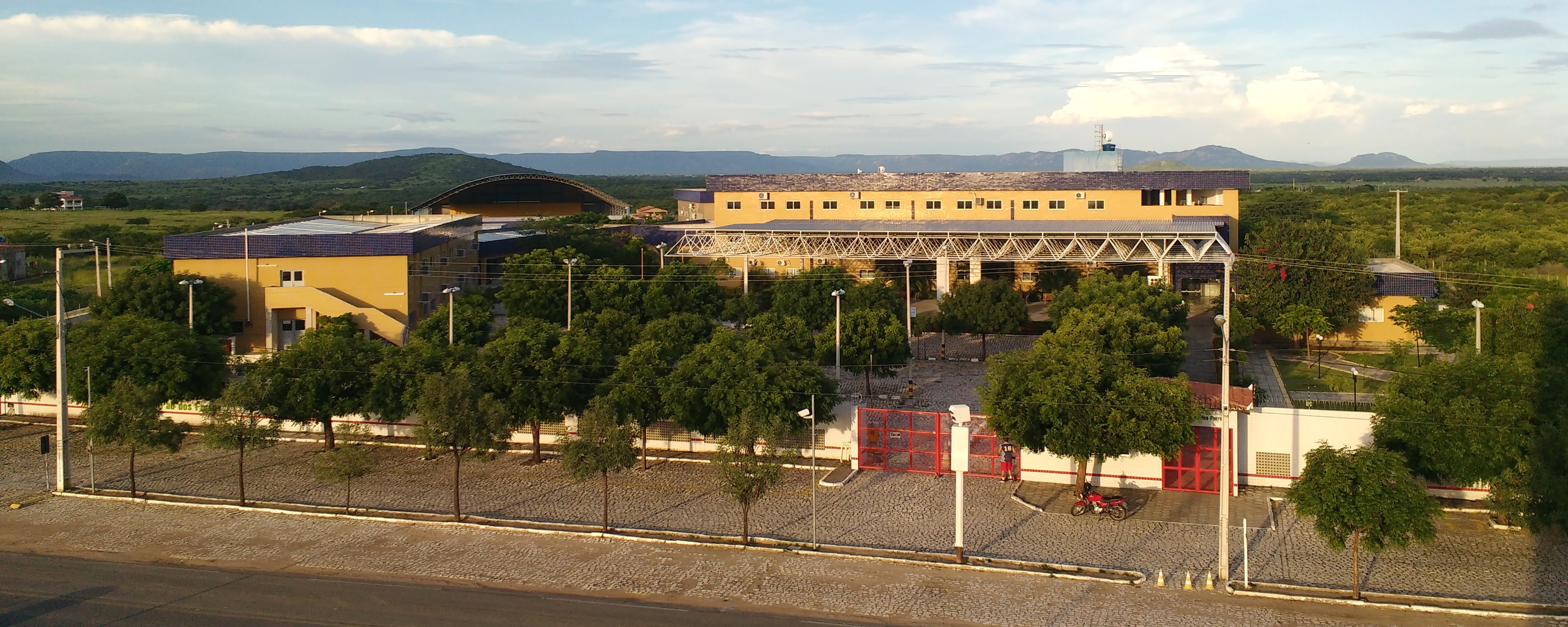 Câmpus do Instituto Federal de Educação, Ciência e Tecnologia do Rio Grande do Norte (IFRN) em Pau dos Ferros, Brasil